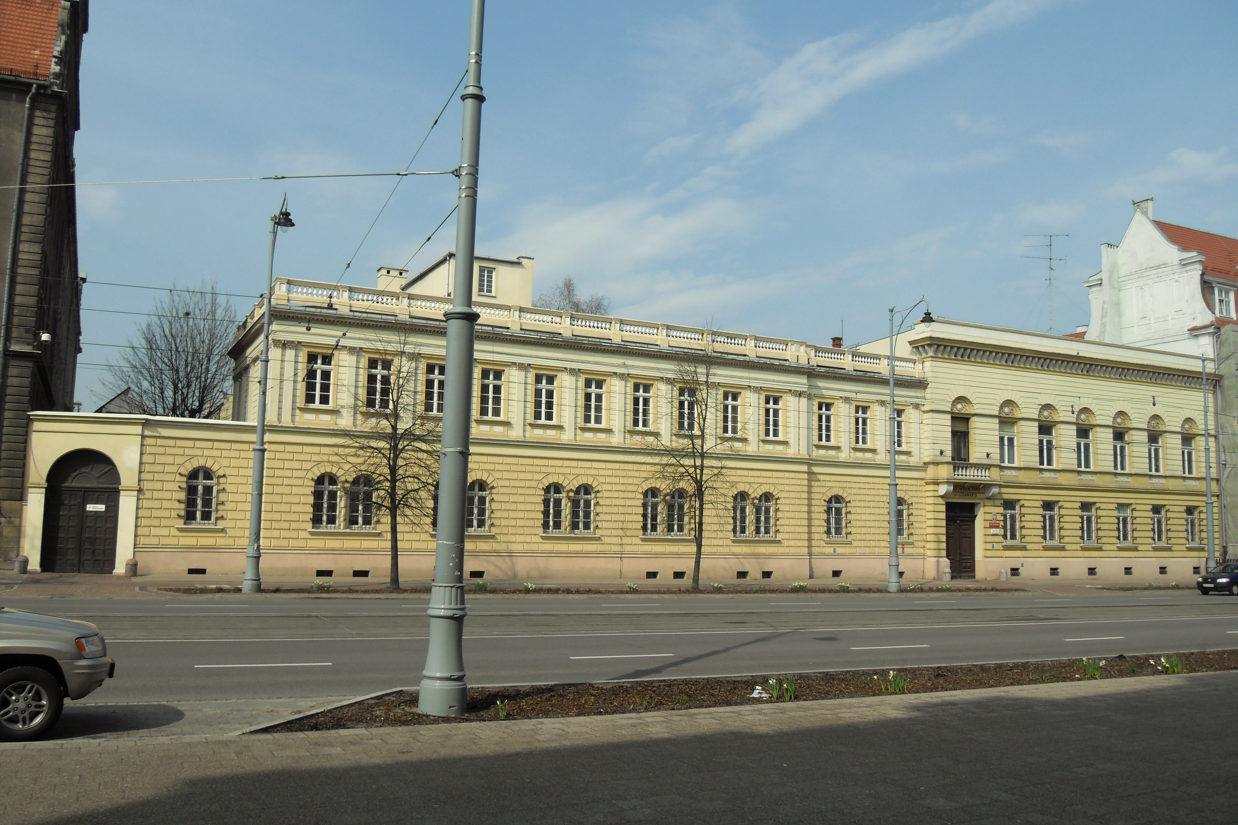 Gdańsk, ul. Nowe Ogrody 28/29.